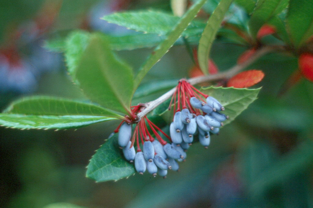 Berberis julianae, frutos. Real Jardín Botánico de Madrid.